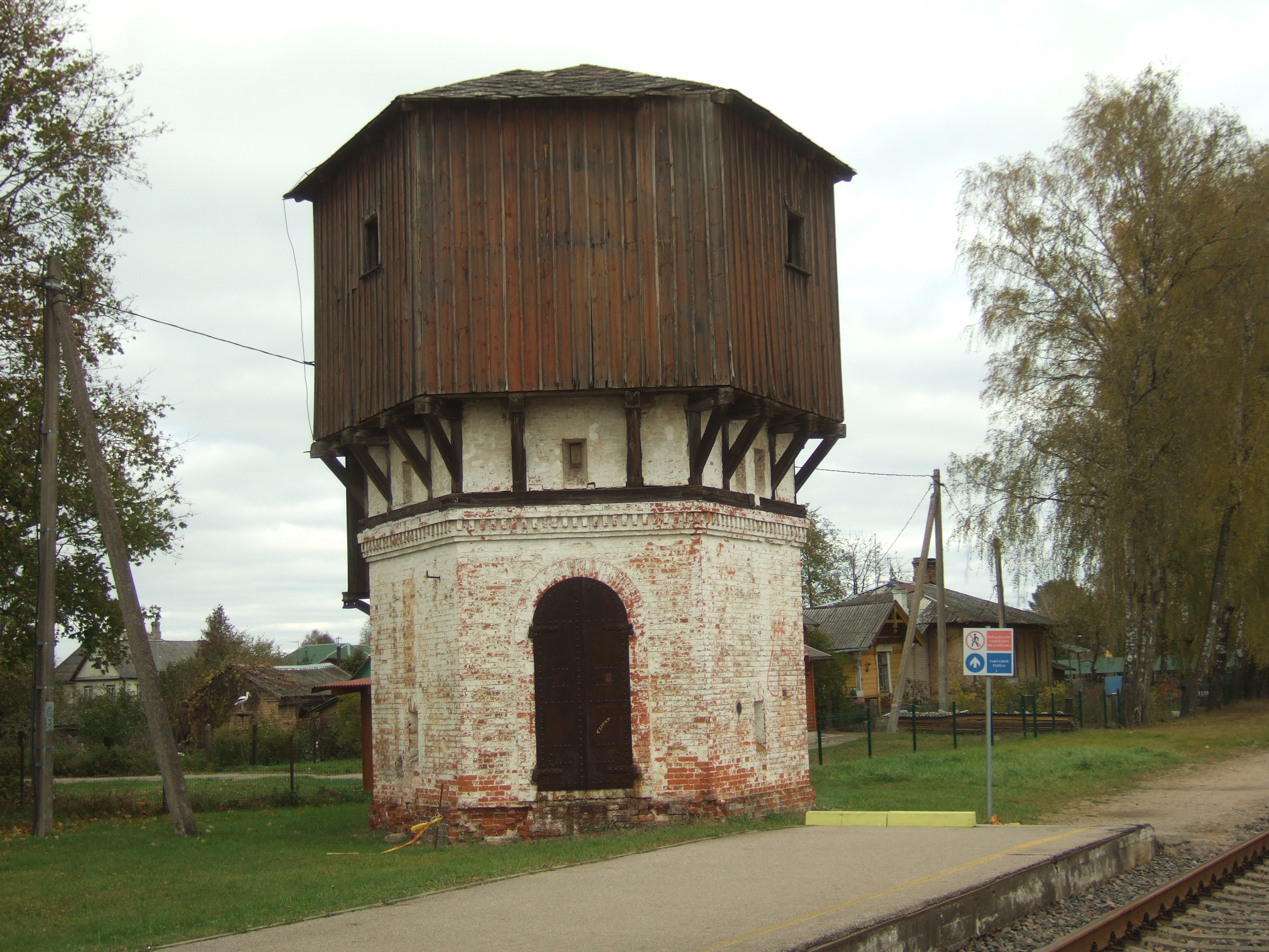 Rūdiškių geležinkelio stoties vandens bokštas